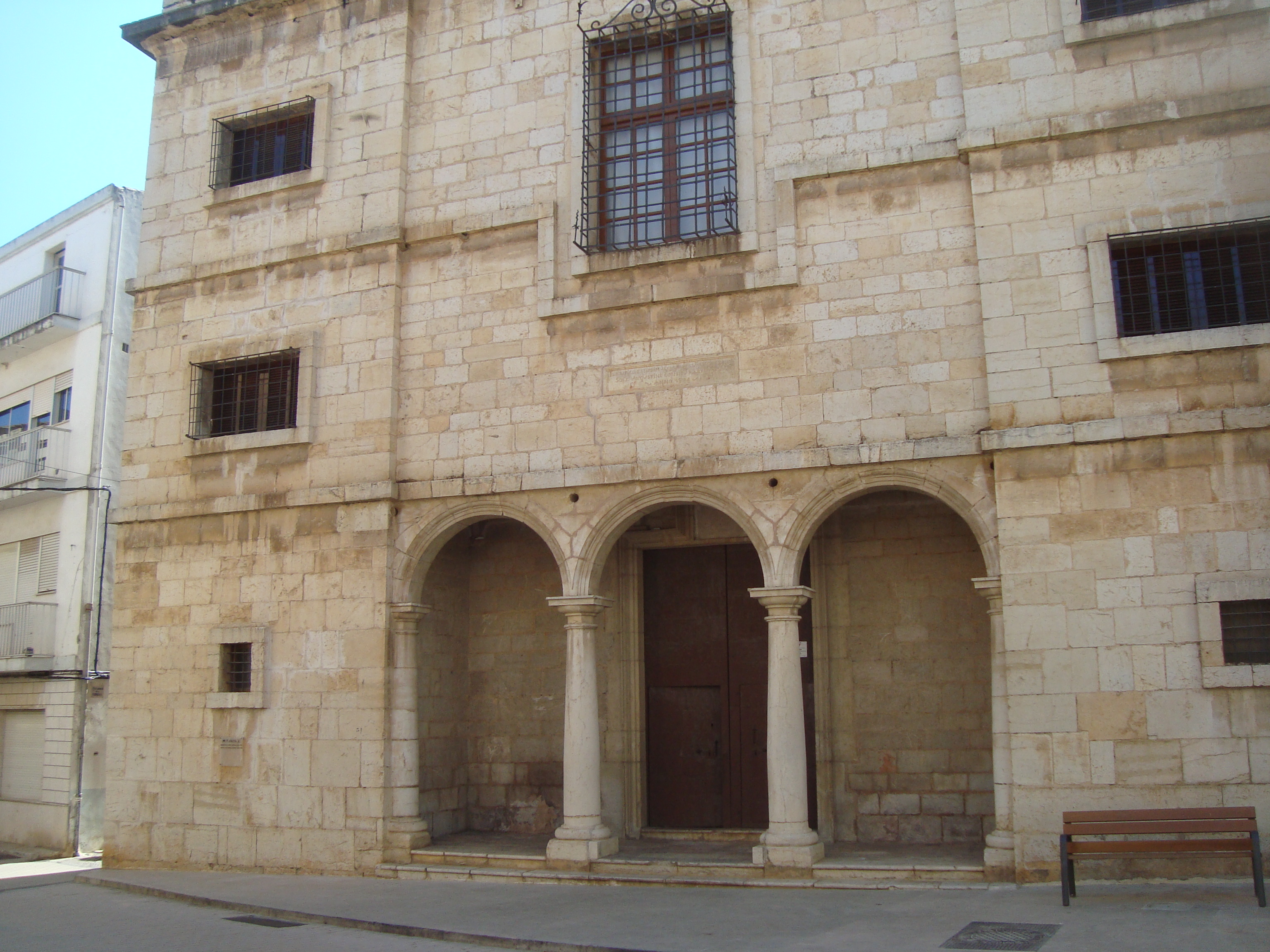 Monestir de Santa Anna (Sant Mateu) . Fachada de la iglesia de las Madres Agustinas de San Mateo (Castellón, España)